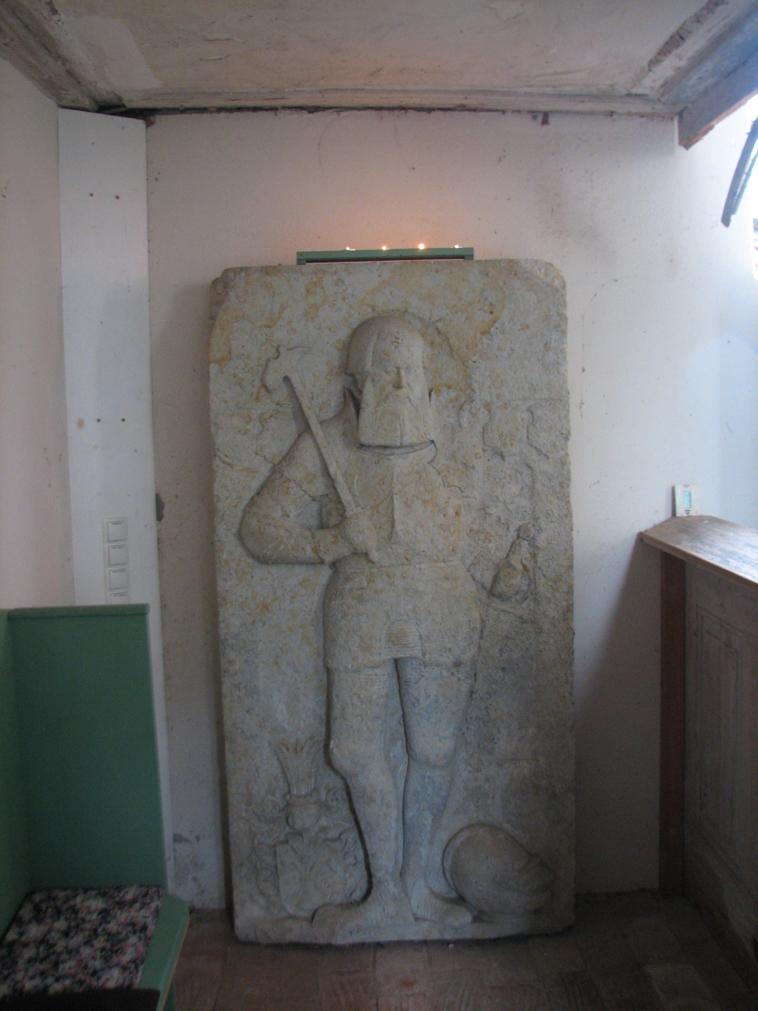 Eins von zahlreichen Epitaphen in der Kirche Schnaditz